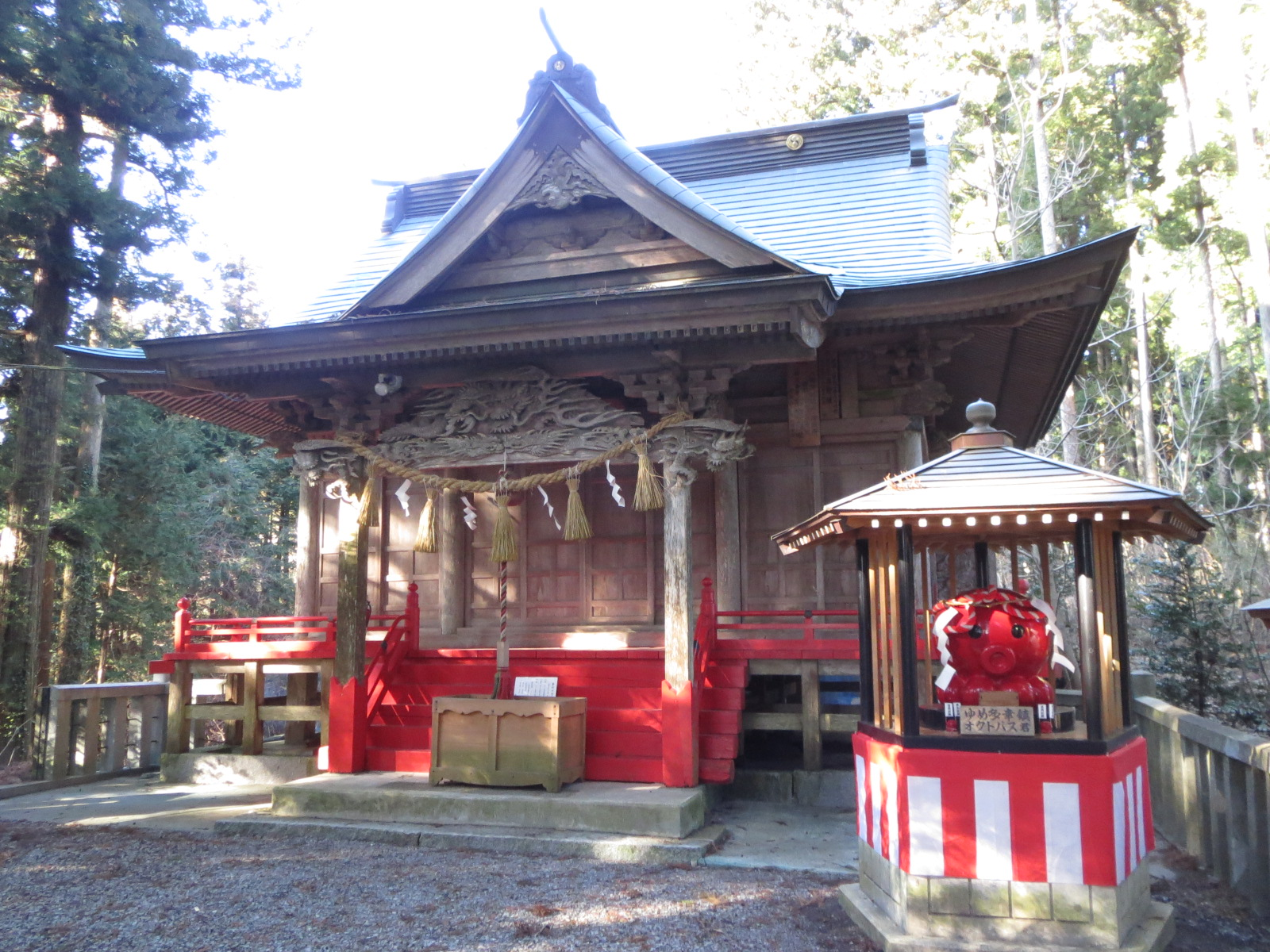 南三陸町にある入谷八幡神社 Canon IXY 3